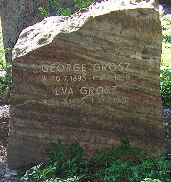 Grabstein von George Grosz, Friedhof Heerstraße, Berlin. Selbst aufgenommen, 29.08.2005